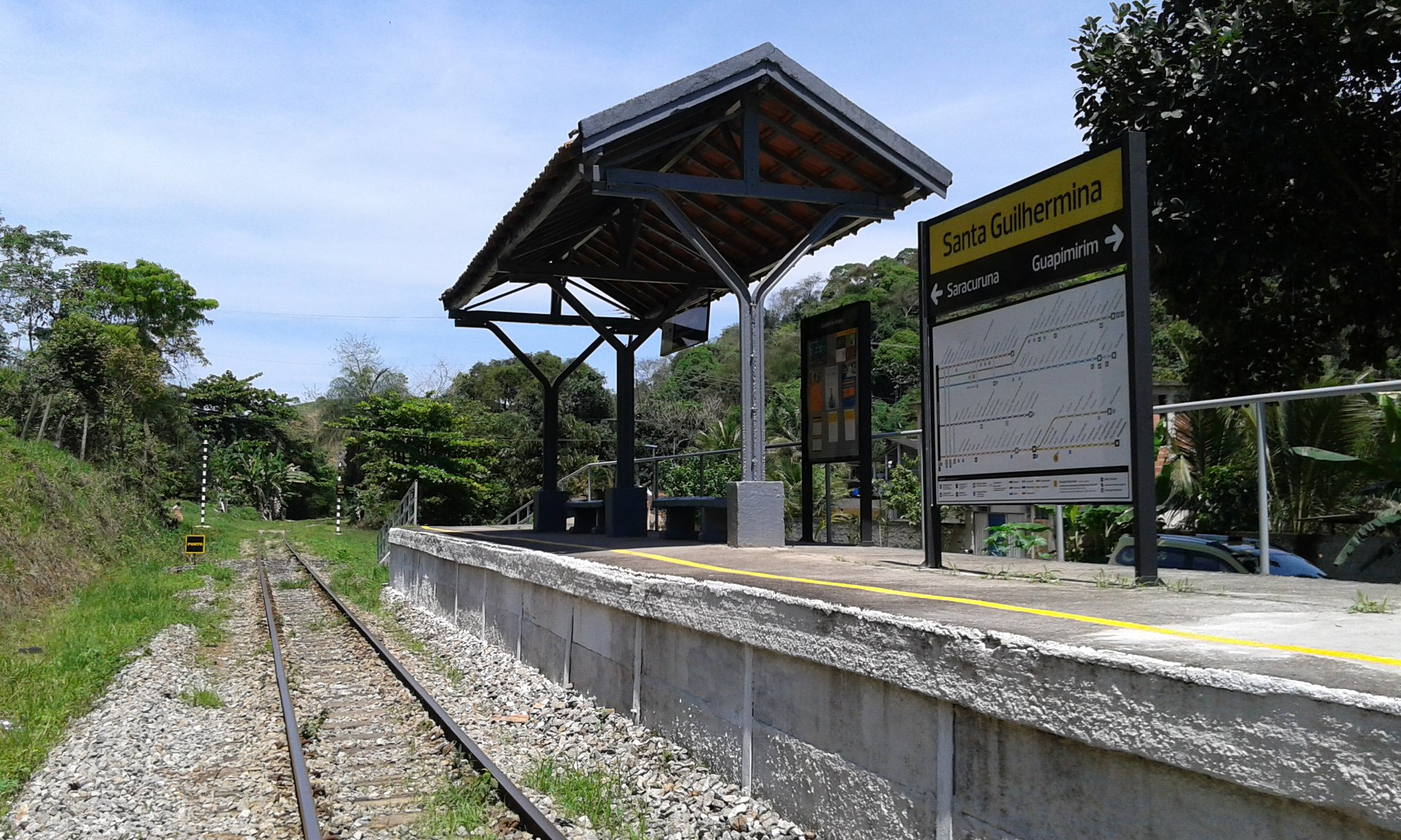 A estação Parada Santa Guilhermina ganhou uma plataforma maior para atender aos passageiros do Ramal Guapimirim, bem como paineis de informações com a nova identidade visual do ramal. Foto: Luíz Felipe Lopes Dias.